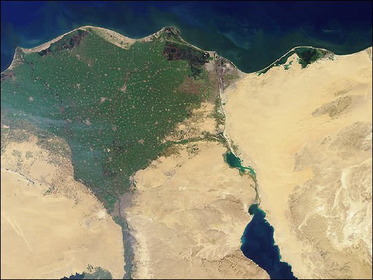 Nildelta Aufnahmedatum: 30. Januar 2001